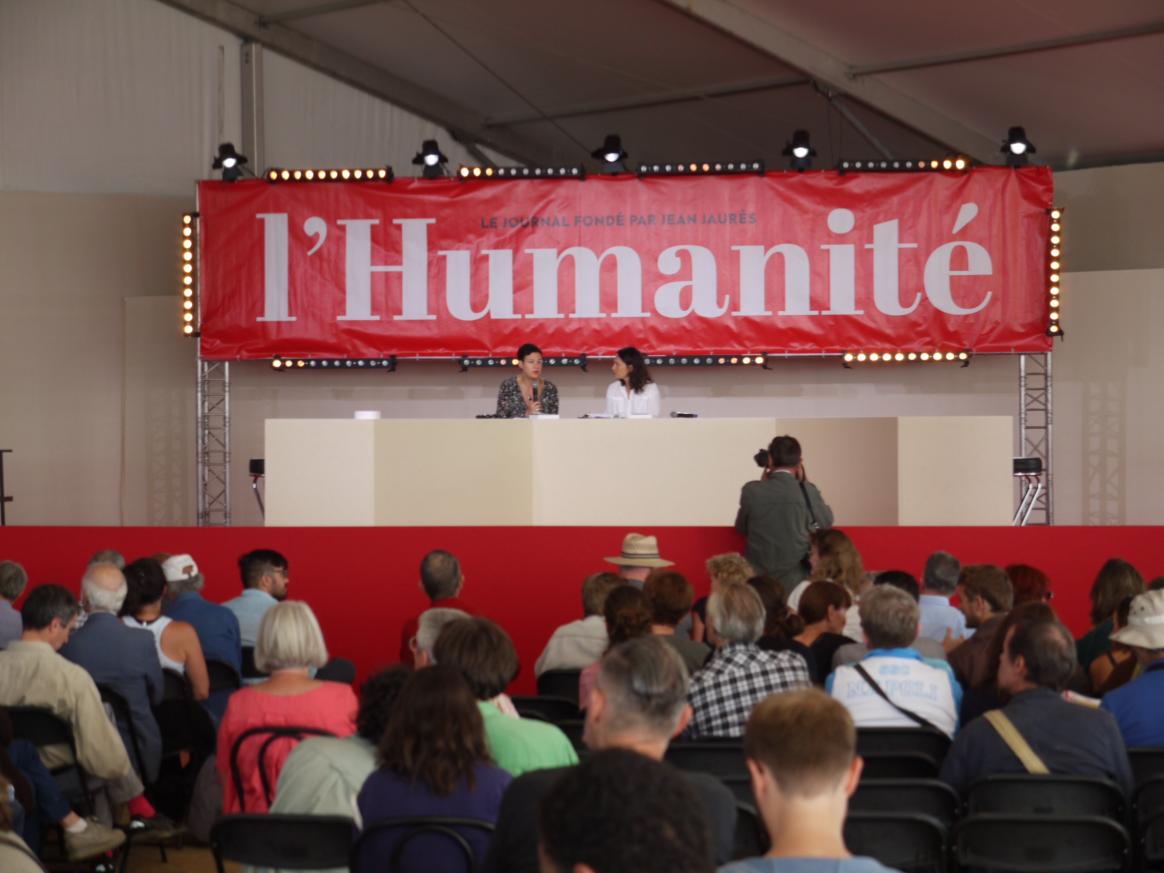 Gisèle Sapiro lors de la fête de l'Humanité le 15 septembre 2018